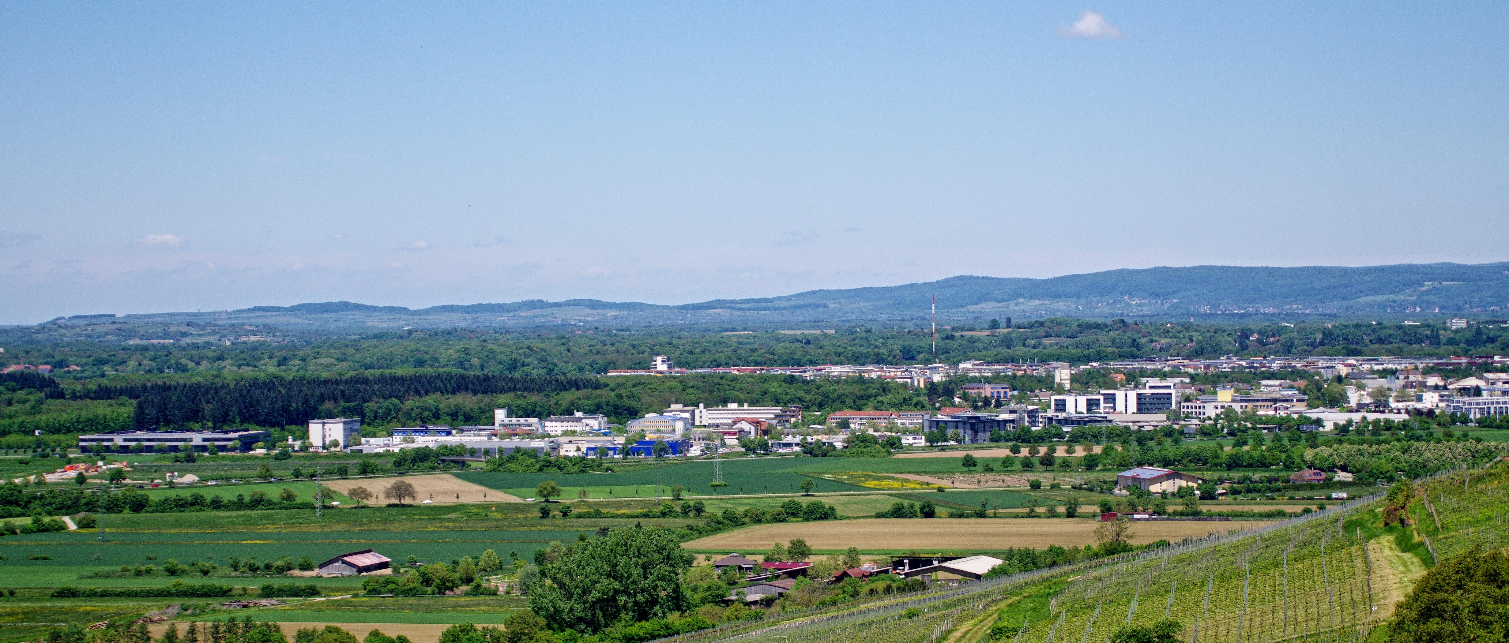 Blick von Ebringen auf das Gewerbegebiet Freiburg Haid